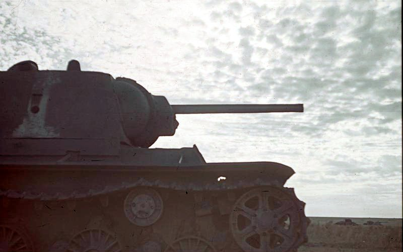 Bilder nach der Panzer-Schlacht vor Stalingrad im August 1942 in der Steppe vor der Stadt